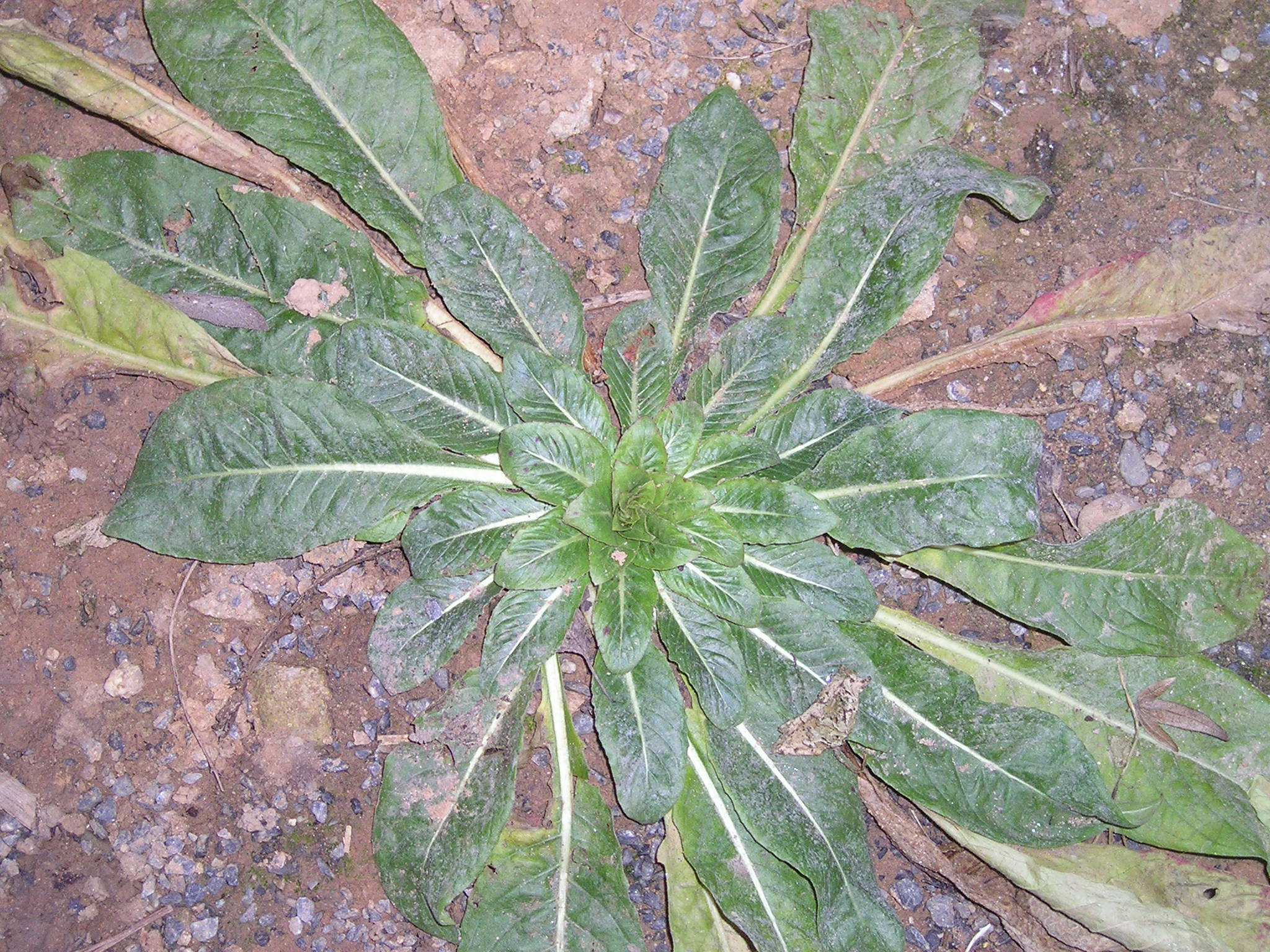 Rosette von Oenothera biennis (Gemeine Nachtkerze)